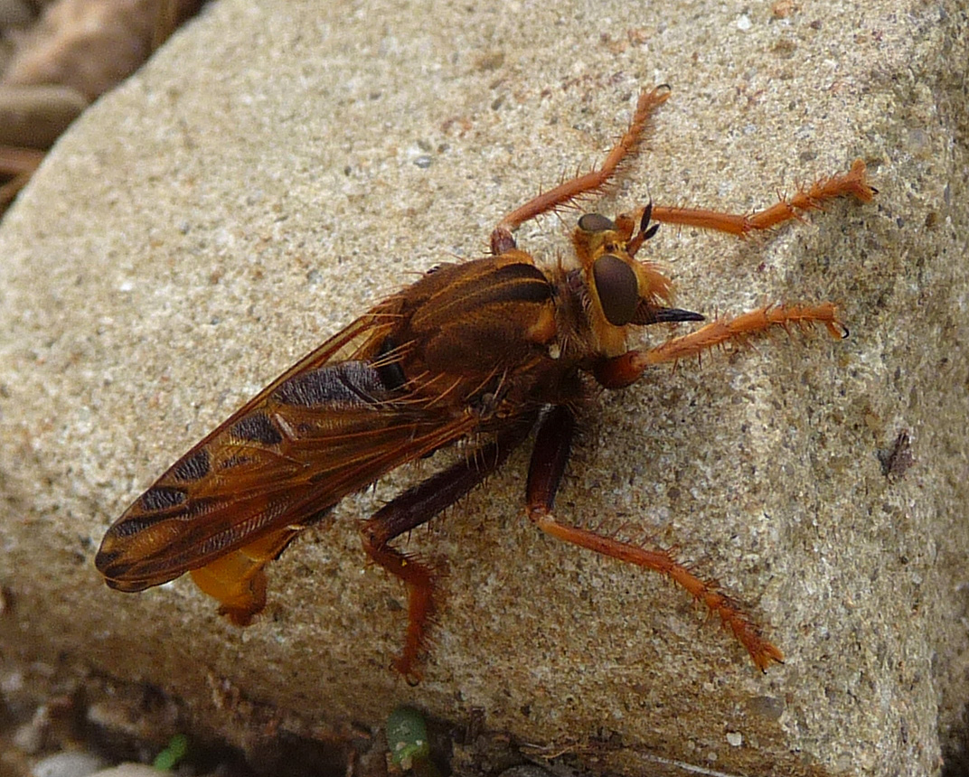 Asilus crabroniformis.